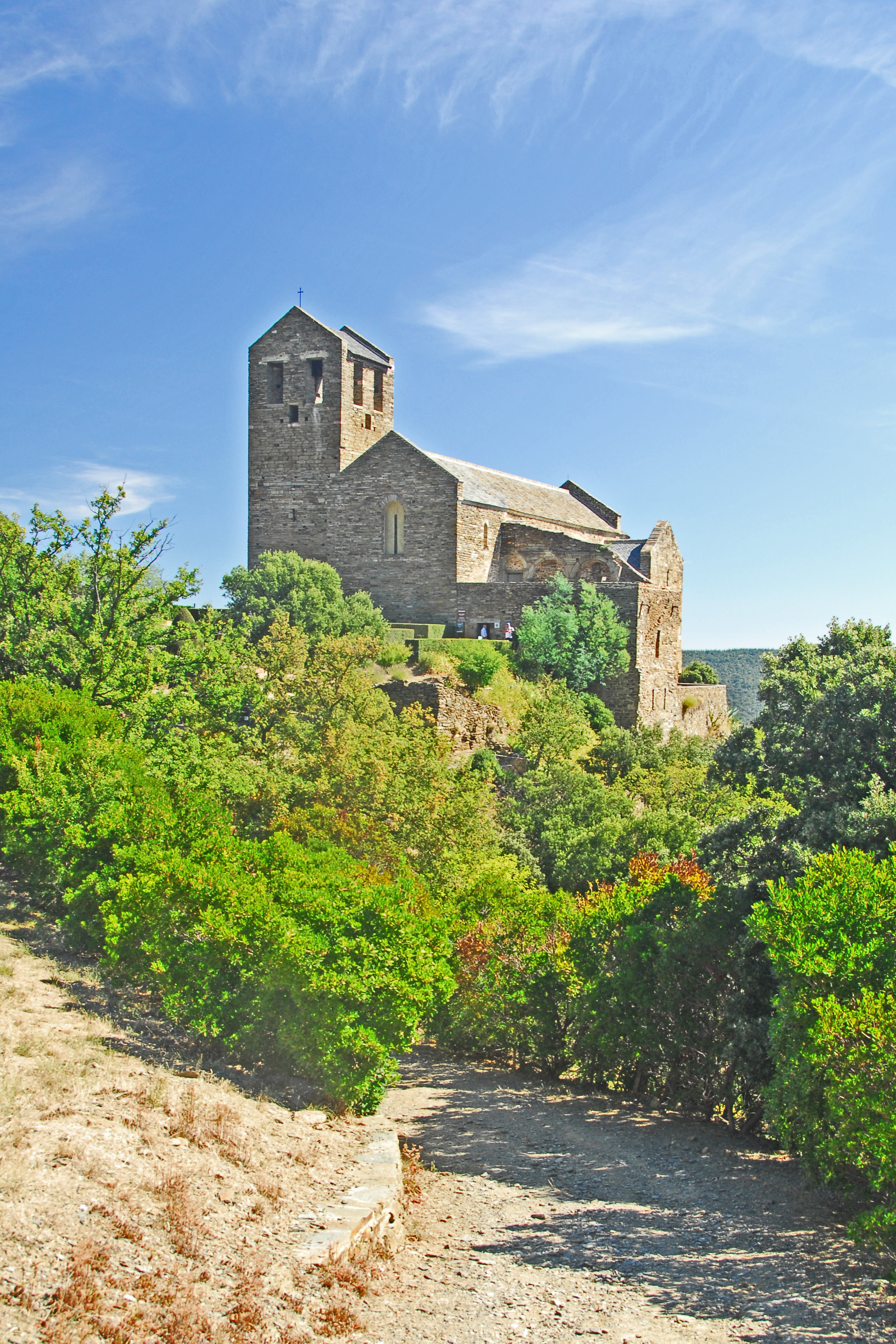 Serrabone, Ansicht von SW